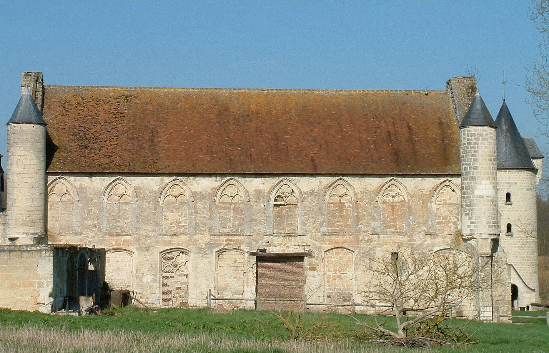 Saint-Nicolas-aux-Bois - Le Tortoir